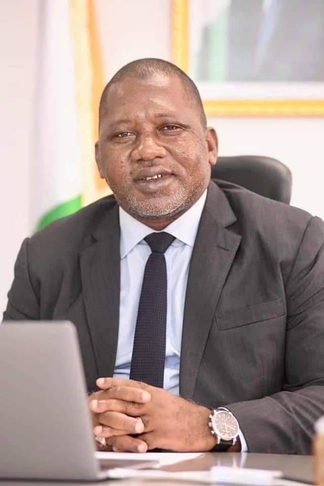 Le Ministre Sidiki Konaté